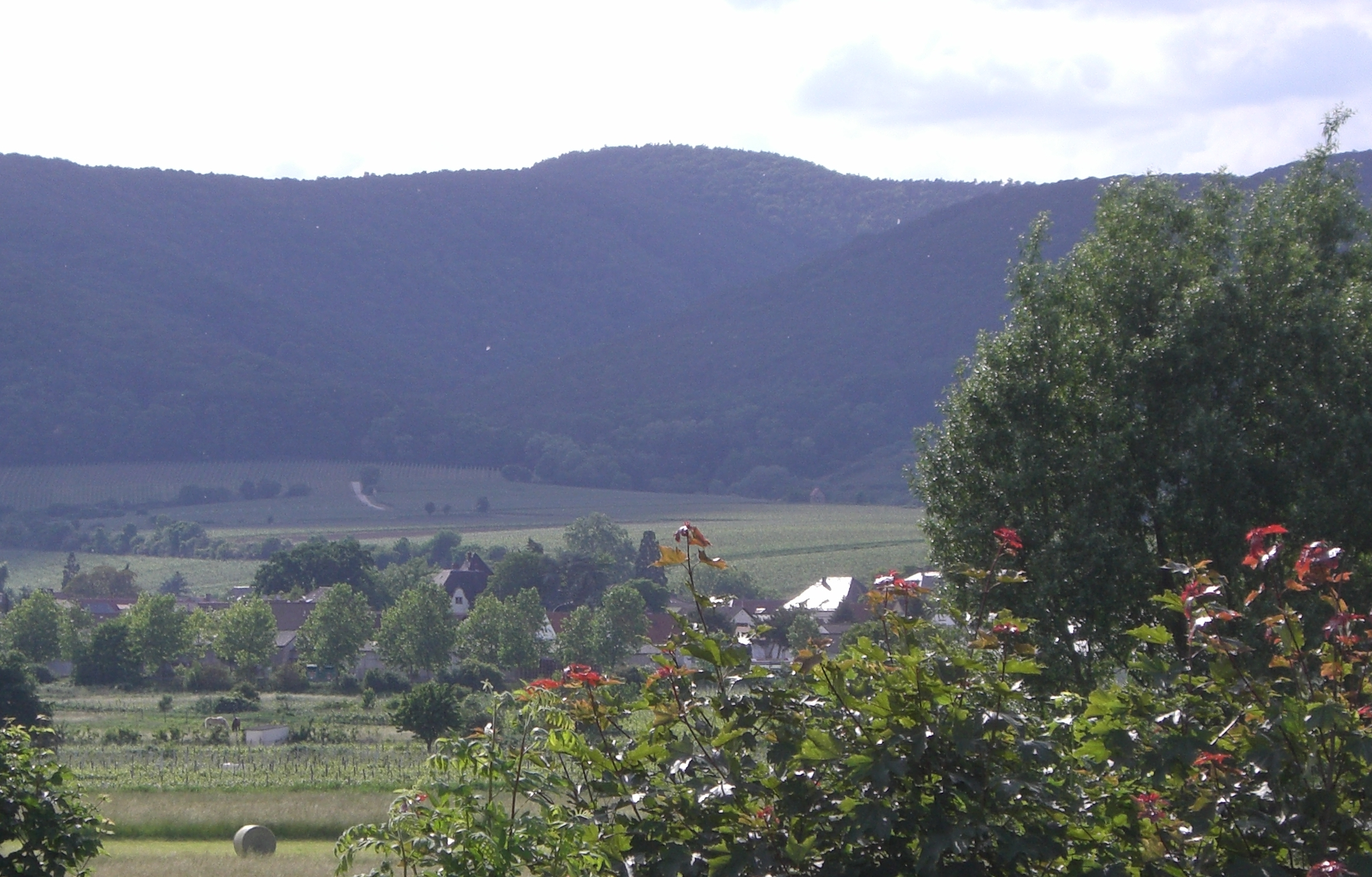 Der Eckkopf (Bildmitte), von Deidesheim fotografiert